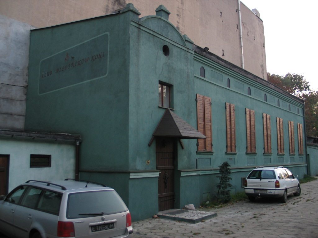 ŁódźZgierska 32, była synagoga obecnie Klub Miłośników Koni